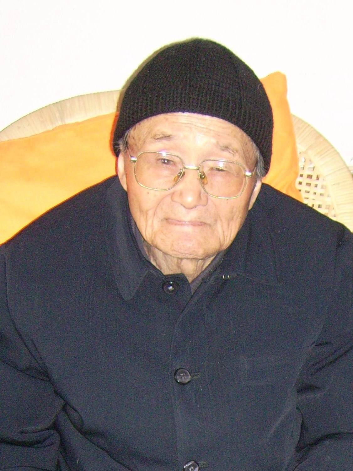 范忠良主教